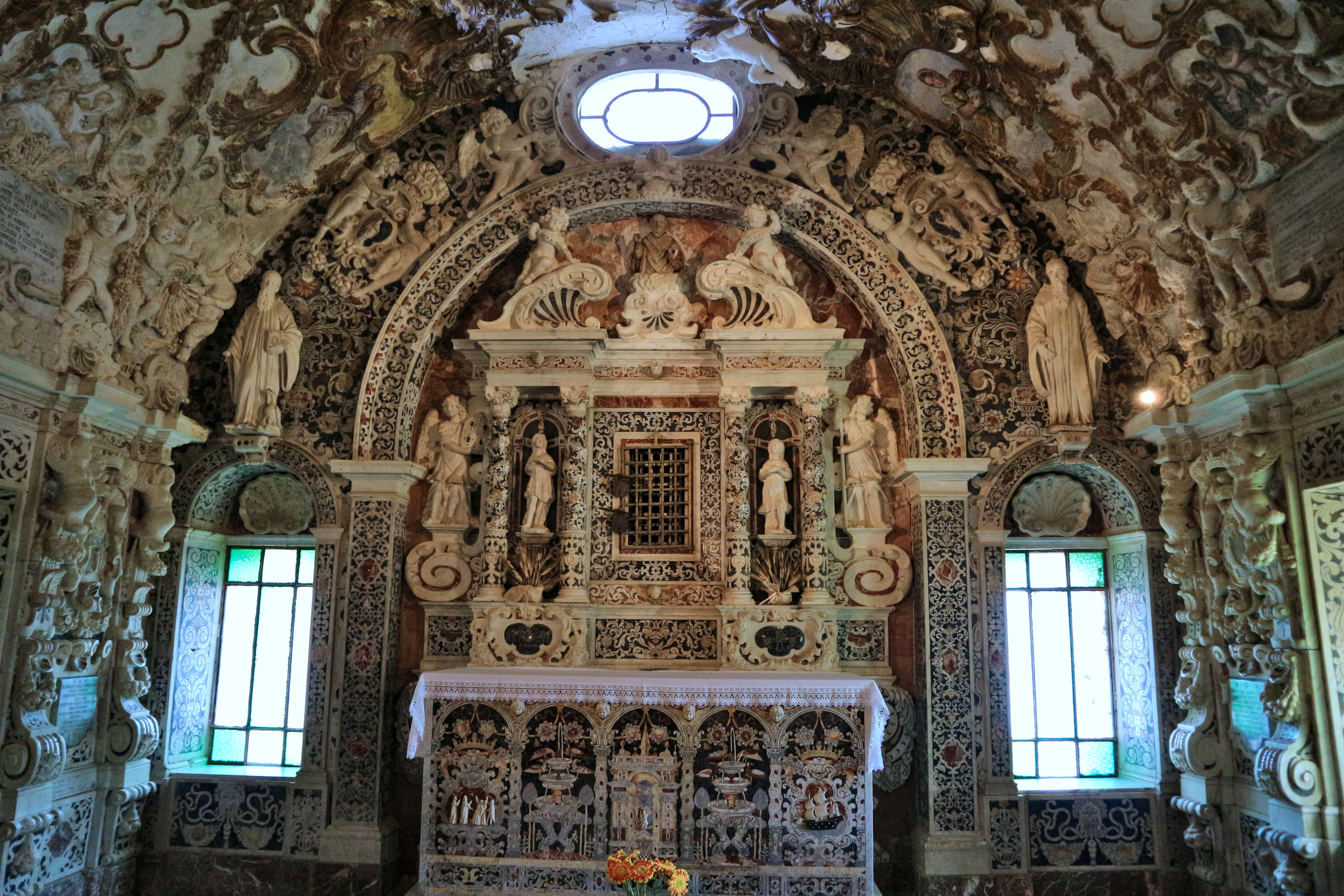 Sepolcro sotto il tempio di San Cono di Naso (ME)